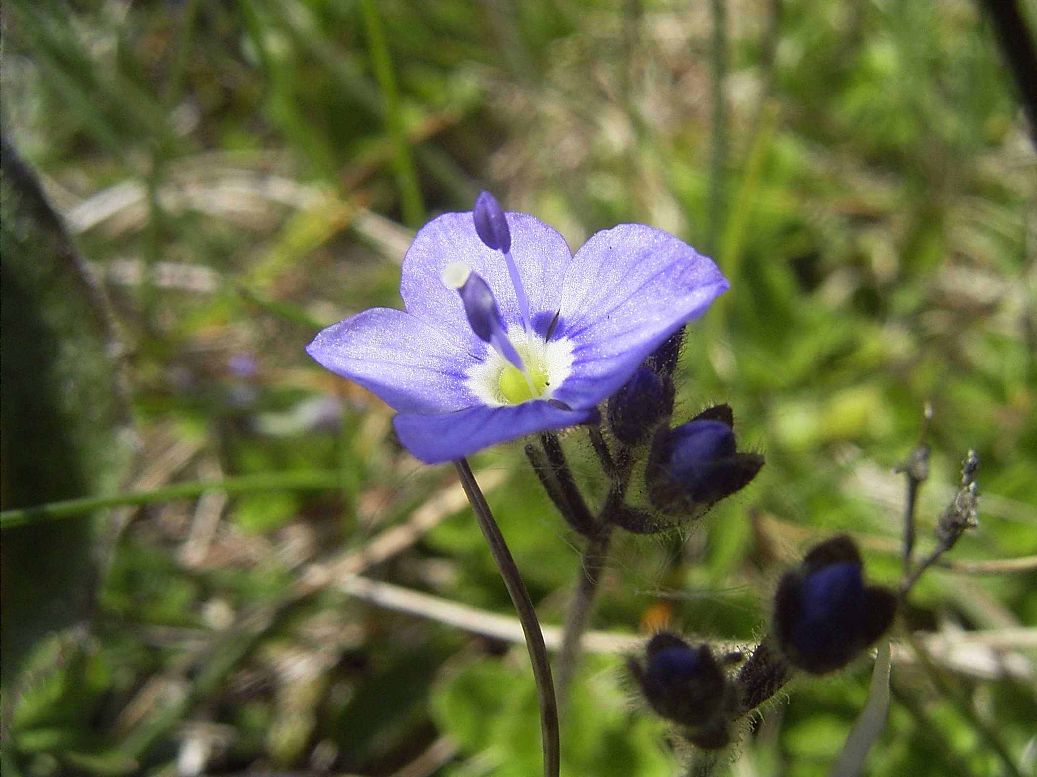 Flora Veronica aphylla at Rax, Austria, June 2006